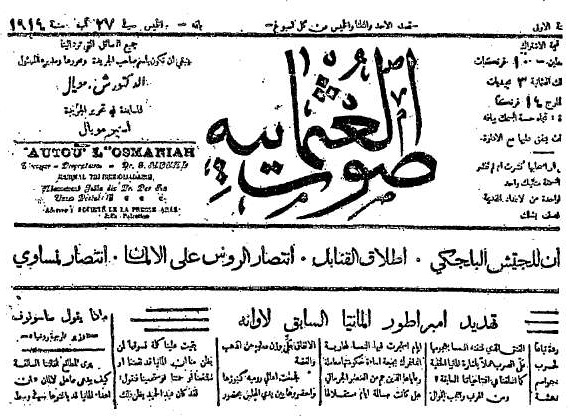 צות אל עותומניה